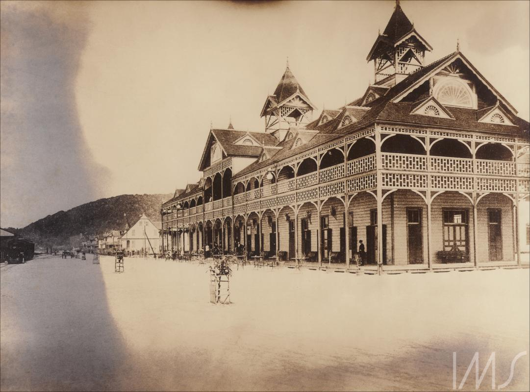 Álbum Fotografias de São Paulo 1900 - Balneário do Guarujá Gaensly, Guilherme Data: 1894 circa Descrição: P&B i. 16,9 X 22,9 cm; s.p. 17,4 X 23,4 cm; s.s. 24,5 X 33 cm (álbum) Gelatina/ Prata Assuntos: Álbum Fotografias de São Paulo 1900 Localidade: Guarujá Praia de Pitangueiras SP Brasil Fonte: Mestres do Séc. XIX